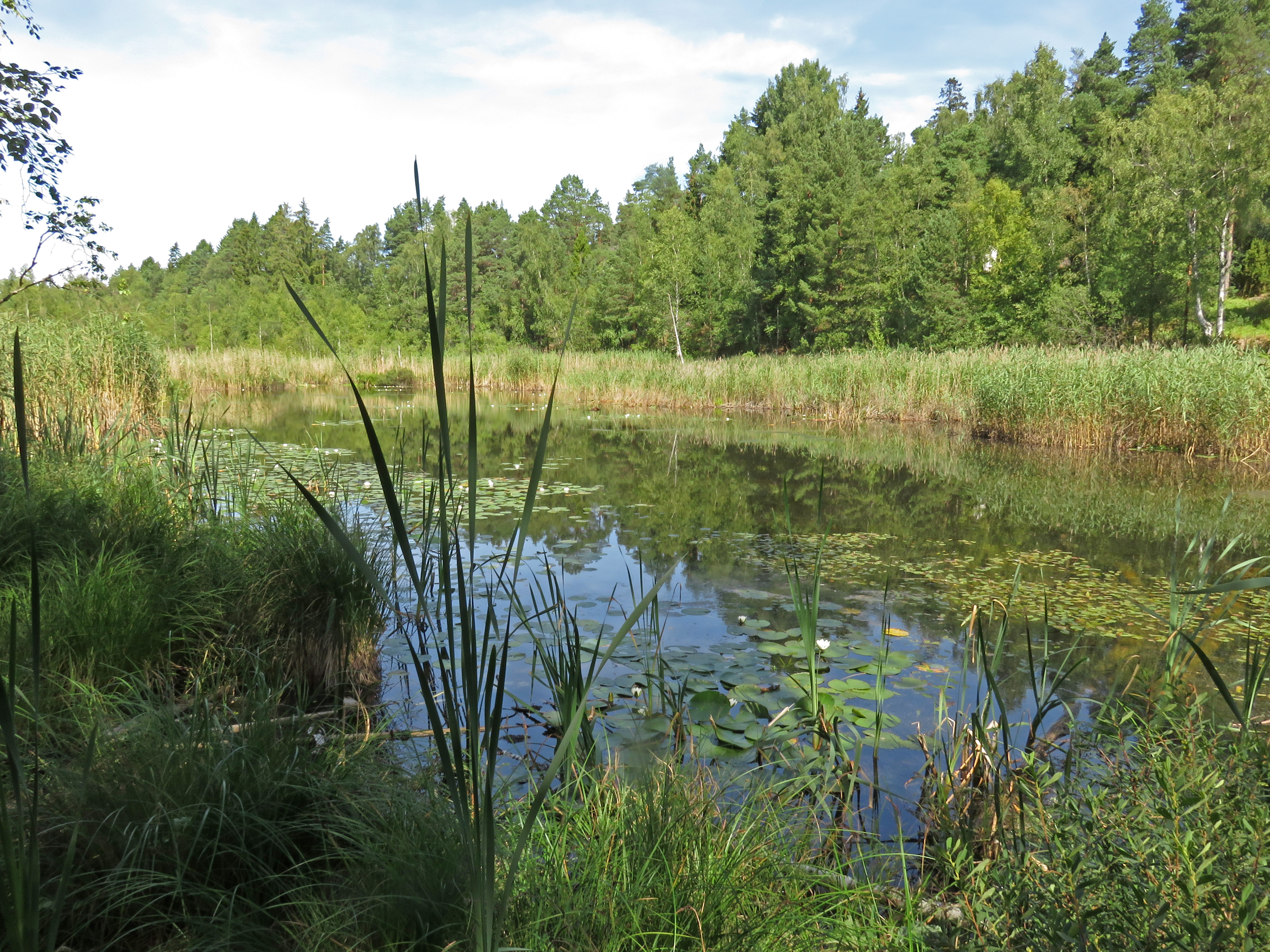 Karptjärnen, Södermanland